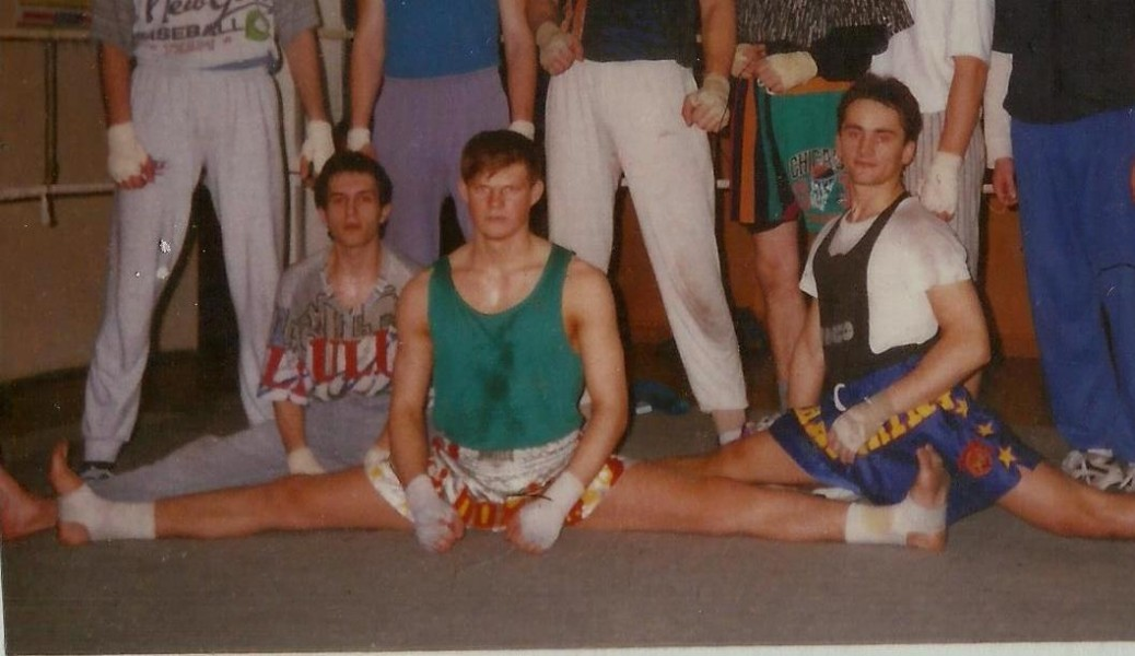 Muay Thai Slovensko 1995 Kvasnička ,Dubovský,Tomčanyi